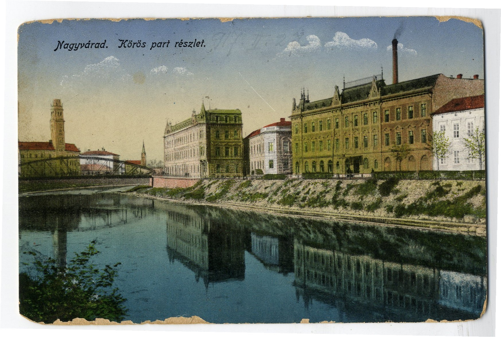 Rimanóczy szálloda a Kőrös-part felől (kéményét azóta lebontották). A tőle balra eső épület a híres Lévay-ház)